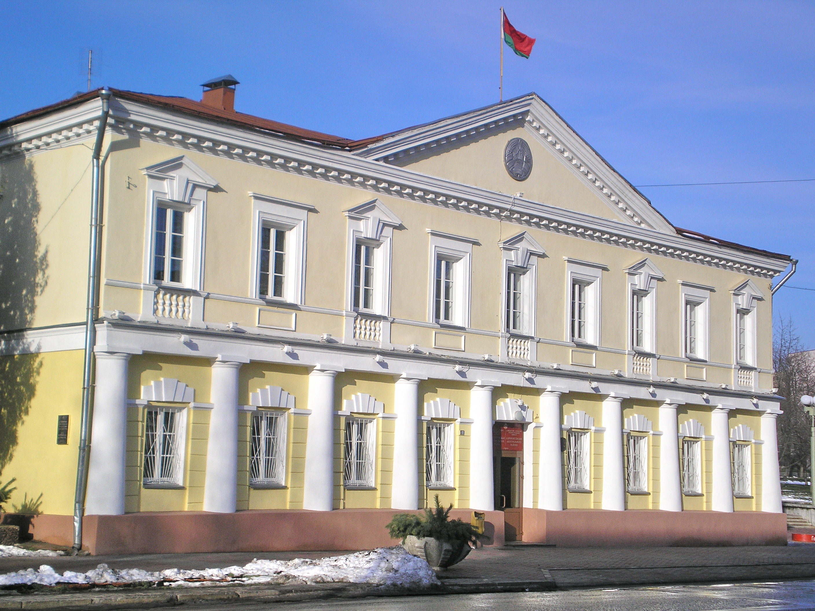 Здание Администрации Центрального района Гомеля